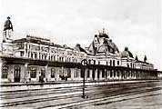 Жмеринський залізничний вокзал (фото 1913 року)